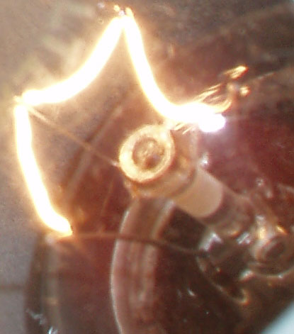 Filamento de bombilla.